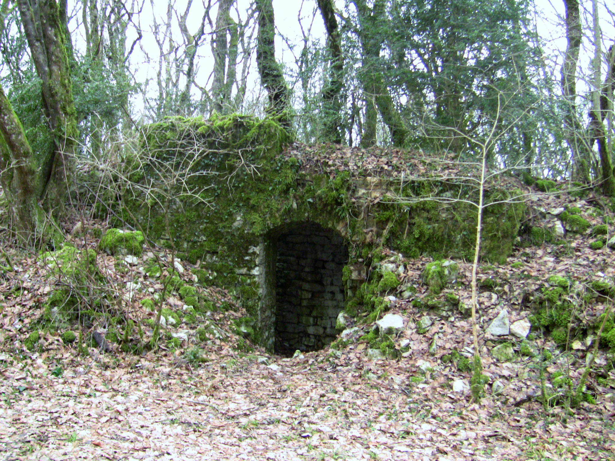 Un abri de la crête nord du fort de Planosie, à Besançon (Doubs, France).